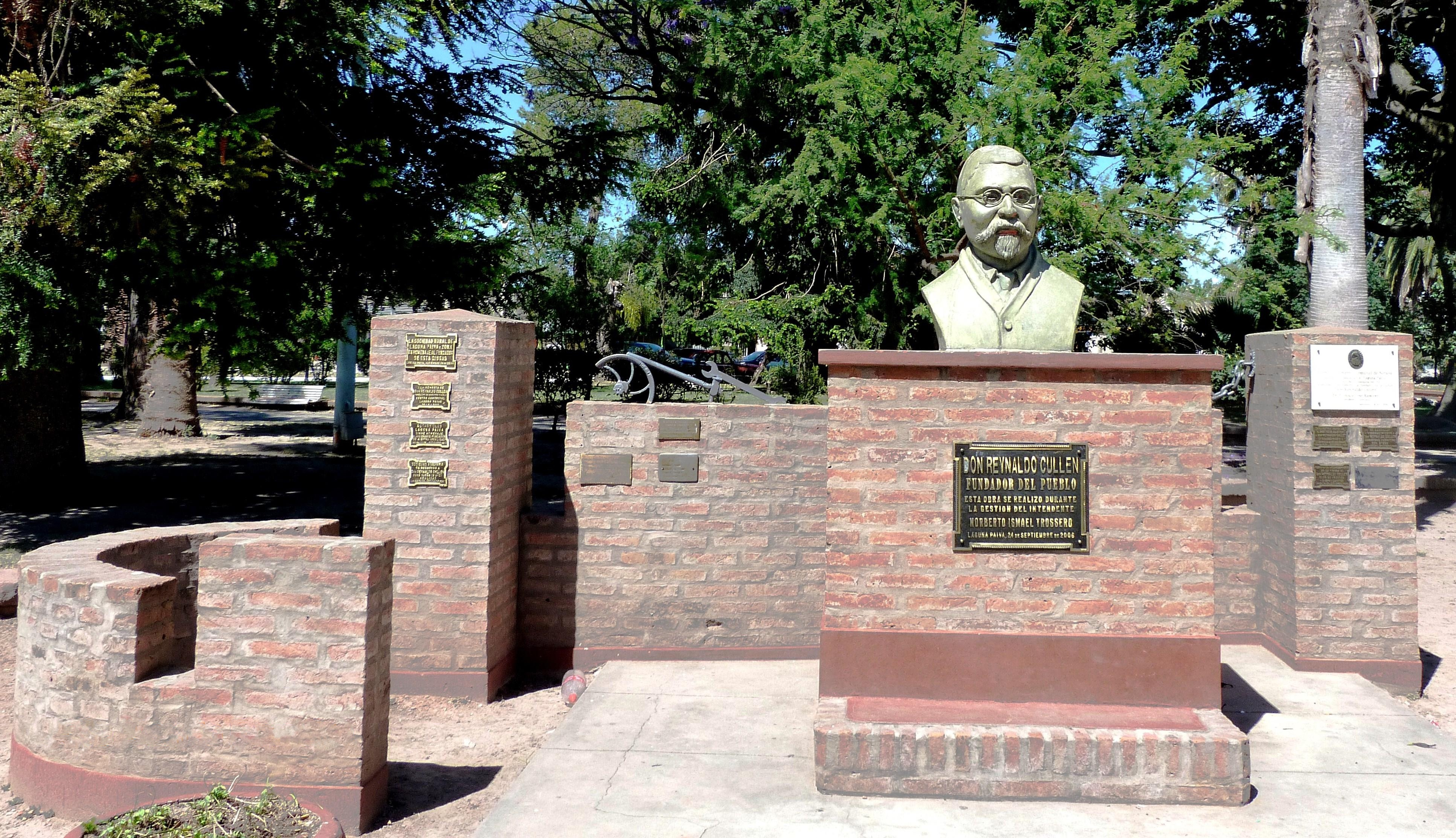 Monumento en homenaje al fundador de Laguna Paiva, Don Reynaldo Cullen.